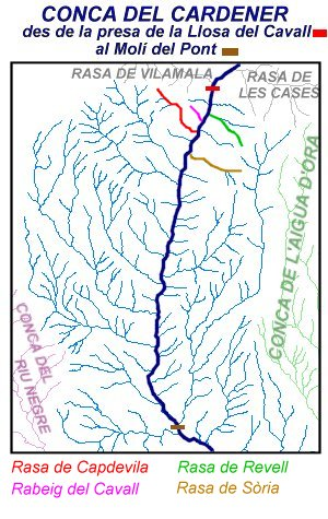 Mapa dun fragment de la Conca del Cardener (de la pres de la Llosa del Cavall al Molí del Pont) on hi apareixen remarcats el Rabeig del Cavall, la Rasa de Capdevila, la Rasa de Revell i la Rasade Sòria.